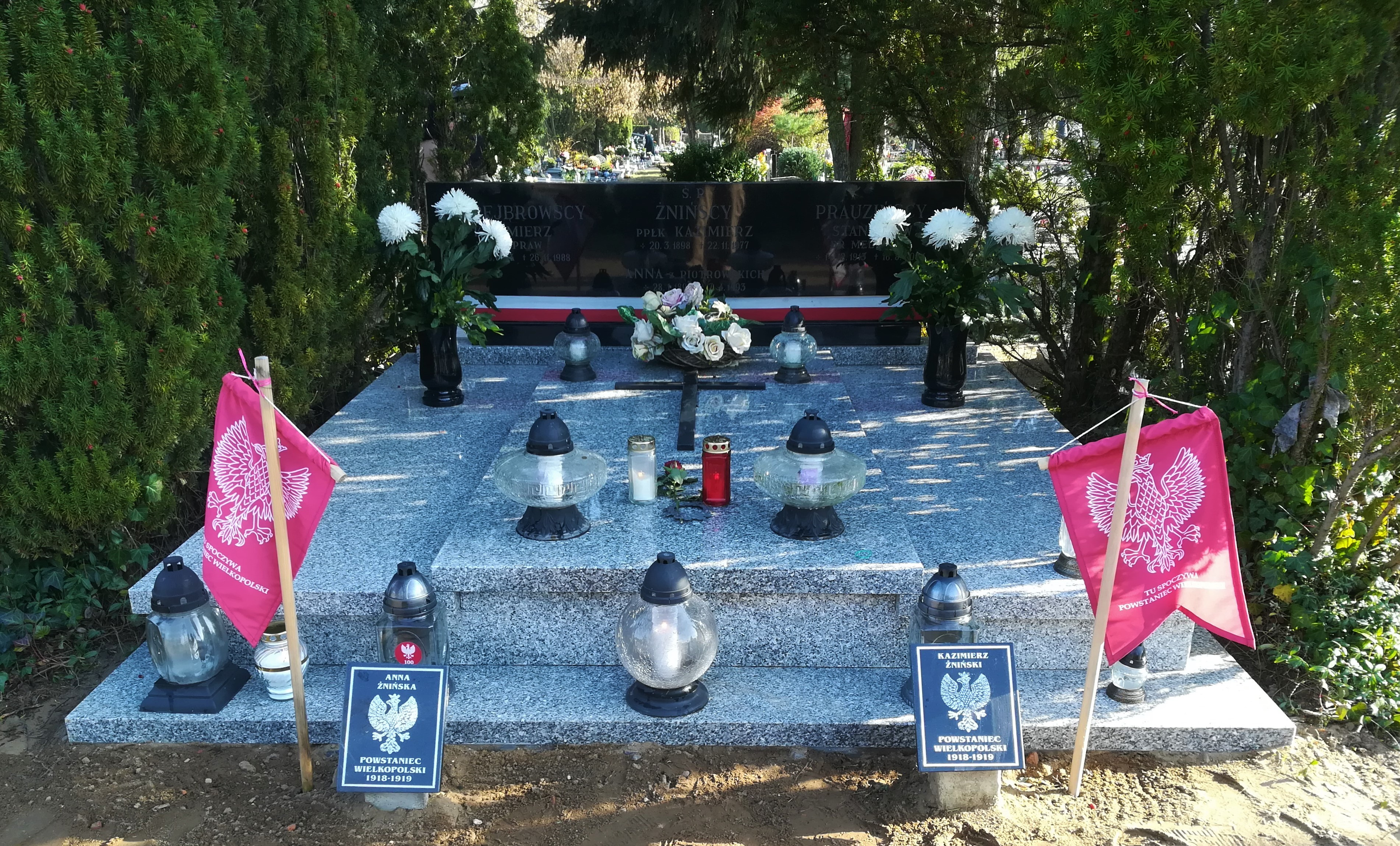 Powstańcy wielkopolscy: Anna i Kazimierz Żnińscy - cm. junikowski w Poznaniu.